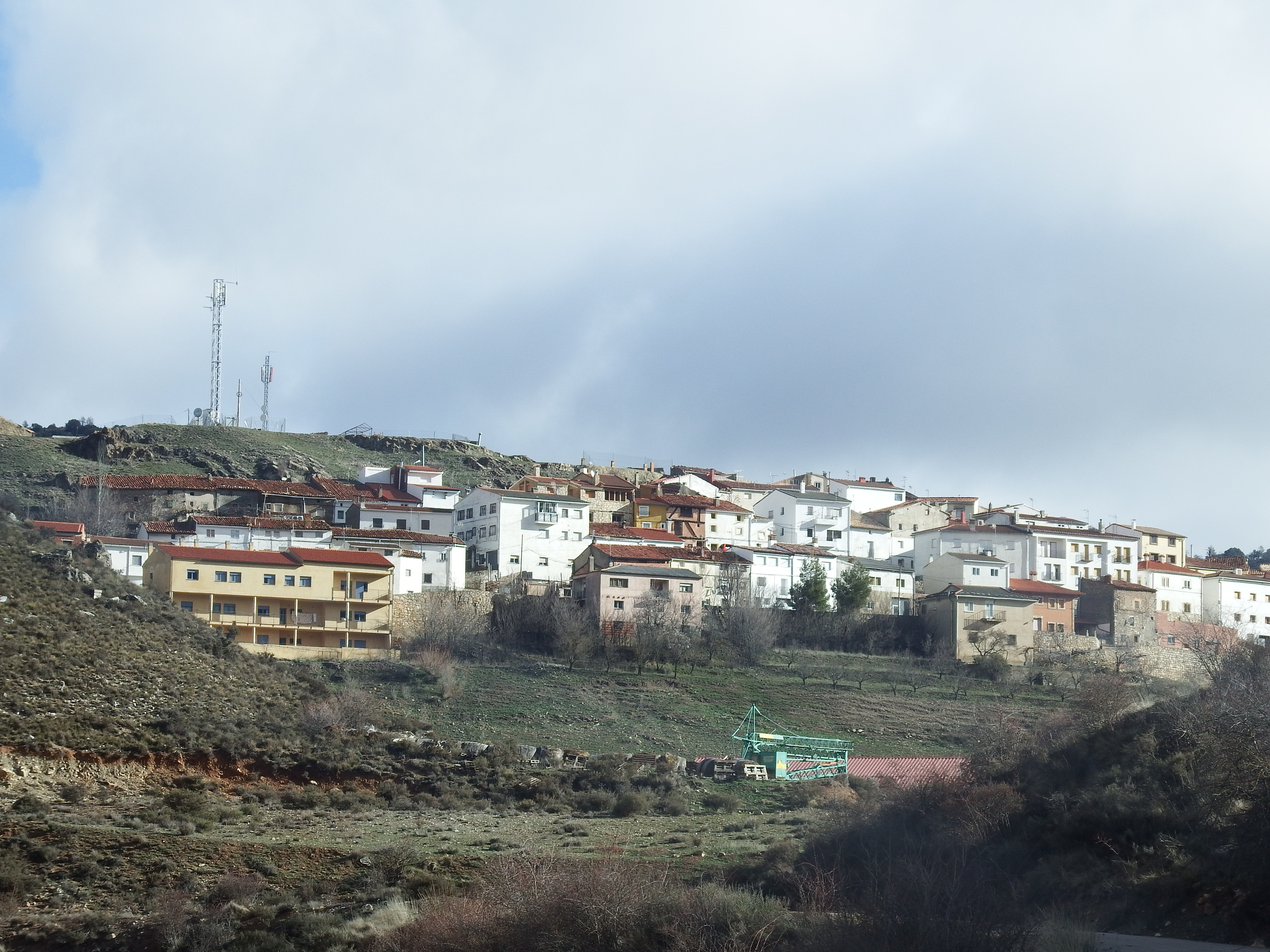 Vista general